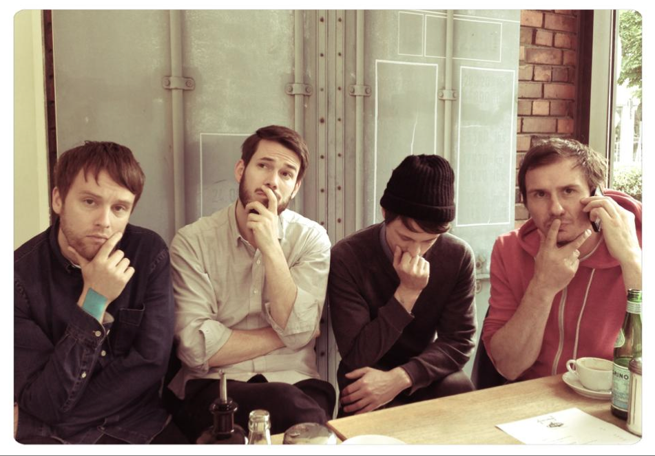 Backstage